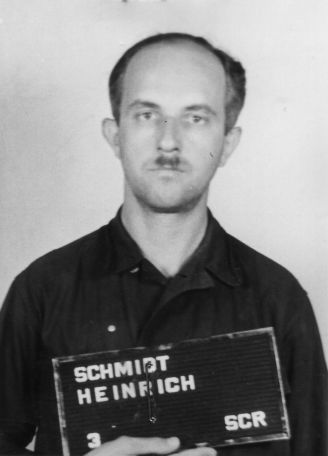 Haftbogenfoto des Angeklagten Heinrich Schmidt (27.03.1912 in Altenburg - 28.11.2000 in Celle), Dr. med., SS-Hauptsturmführer, SS-Arzt in den Konzentrationslagern Sachsenhausen, Buchenwald, Majdanek und Groß-Rosen, Lagerarzt im Außenlager Boelcke-Kaserne des Konzentrationslagers Mittelbau-Dora, im Dachauer Dora-Prozess ("Case No. 000-50-37 Dora") am 30.12.1947 freigesprochen, 1948 in einem Spruchkammerverfahren zu einem halben Jahr Haft verurteilt; 1979 im Düsseldorfer Majdanek-Prozess freigesprochen.